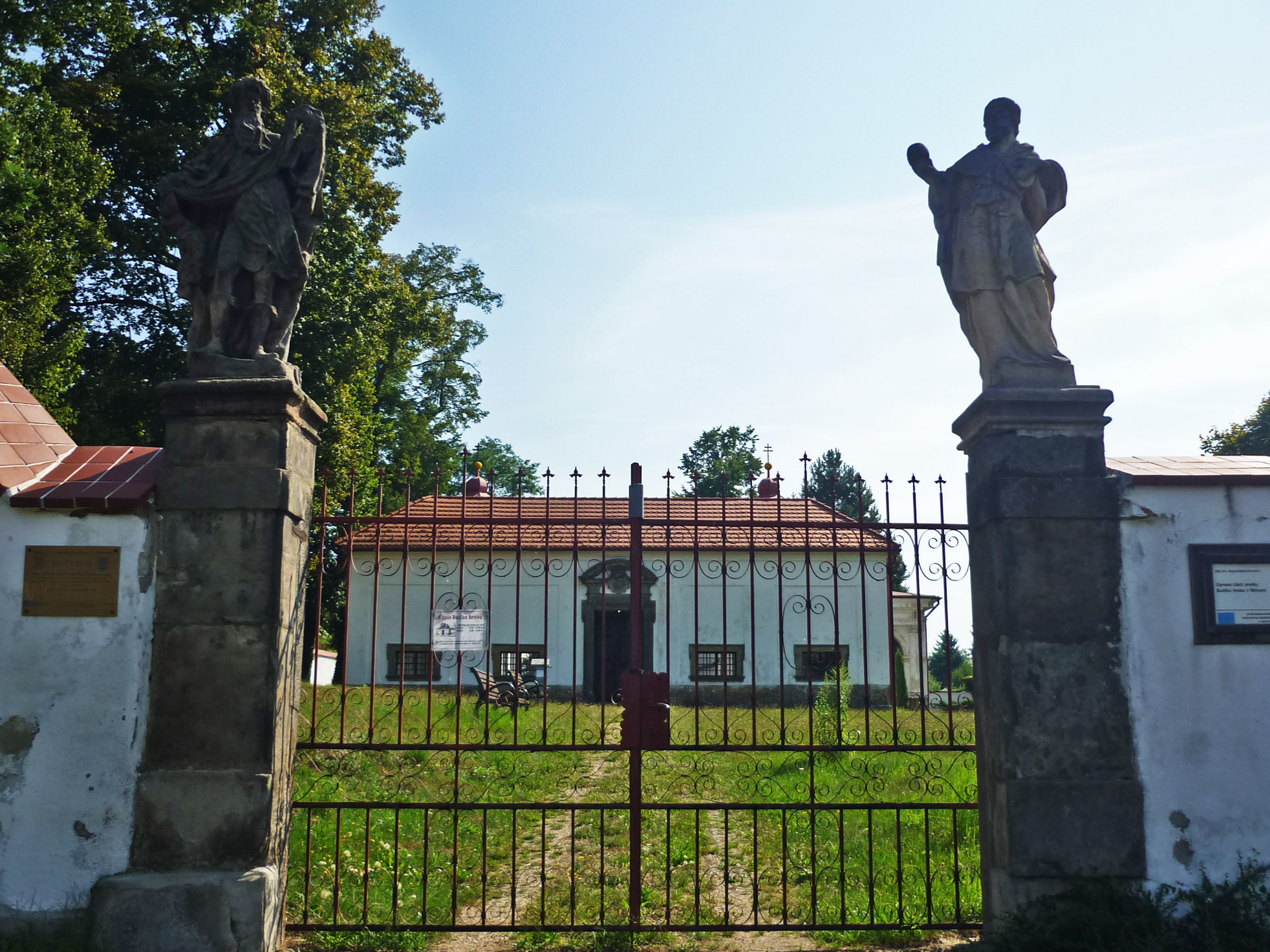 Kirche der Heilig-Grab-Kapelle in Niemes (Mimoň)